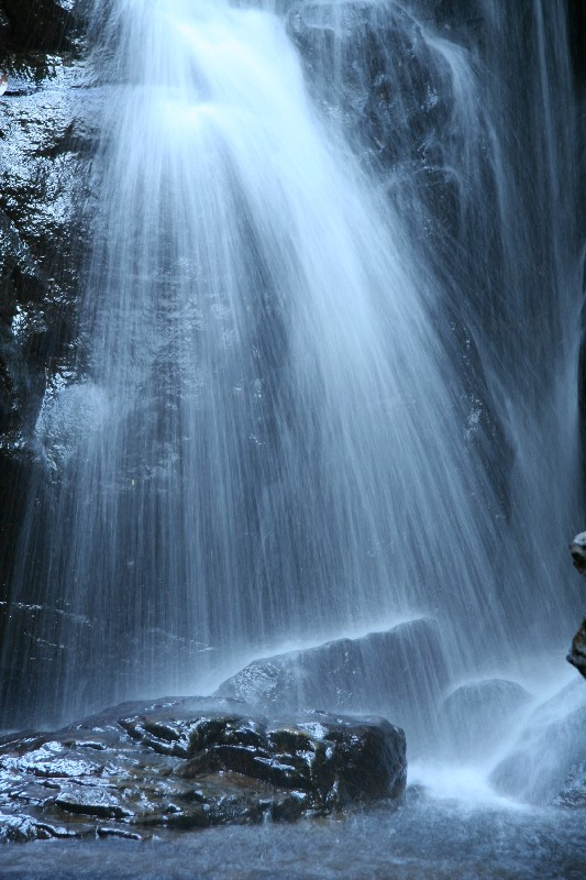 Waterfall Suoi Tranh